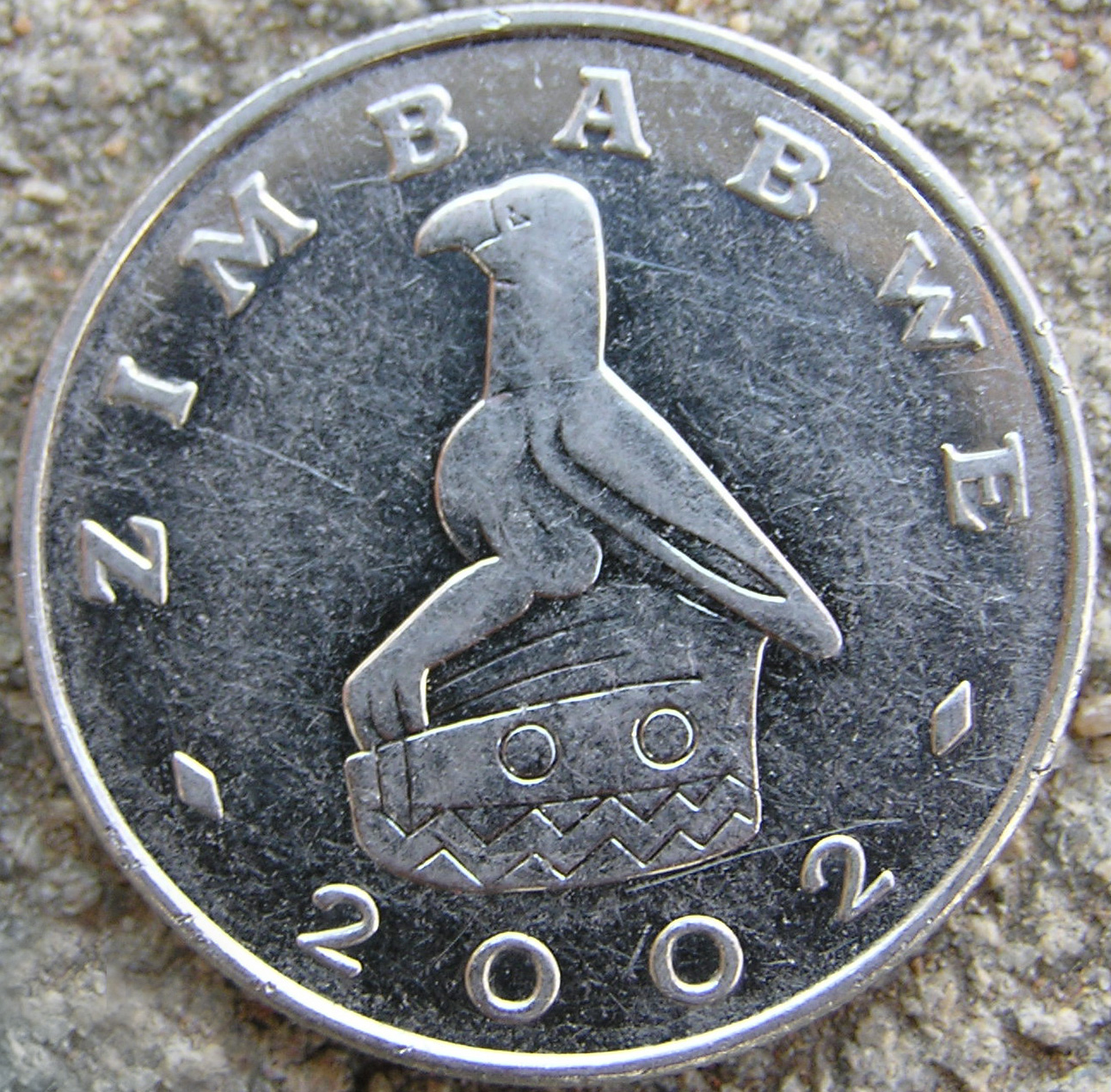 pièce de 1 Dollar du Zimbabwe